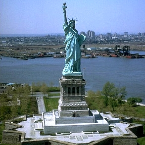 Estatua de La Libertad